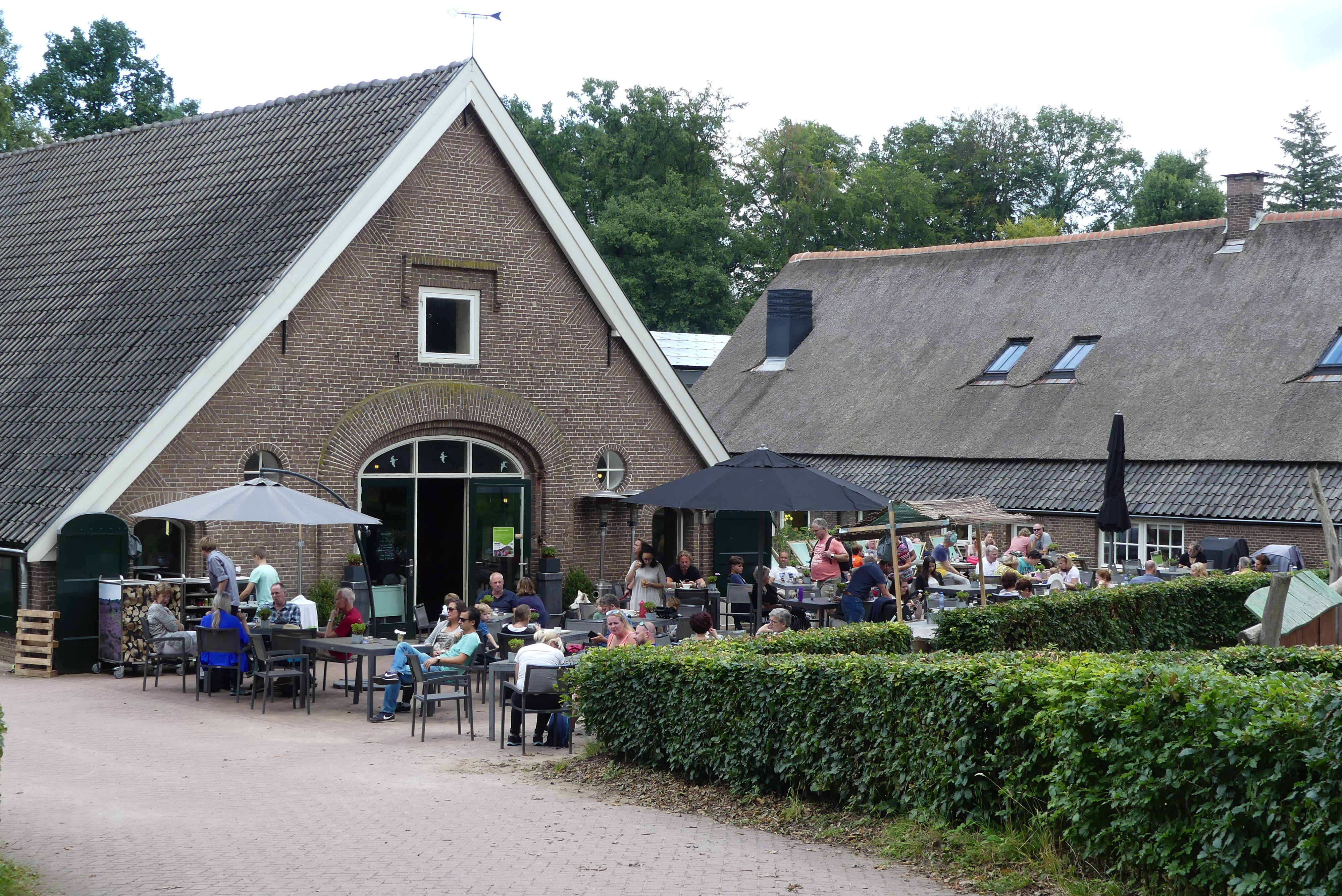 Zicht oop terras van bezoekerscentrum Veluwezoom van Natuurmonumenten nabij Rheden